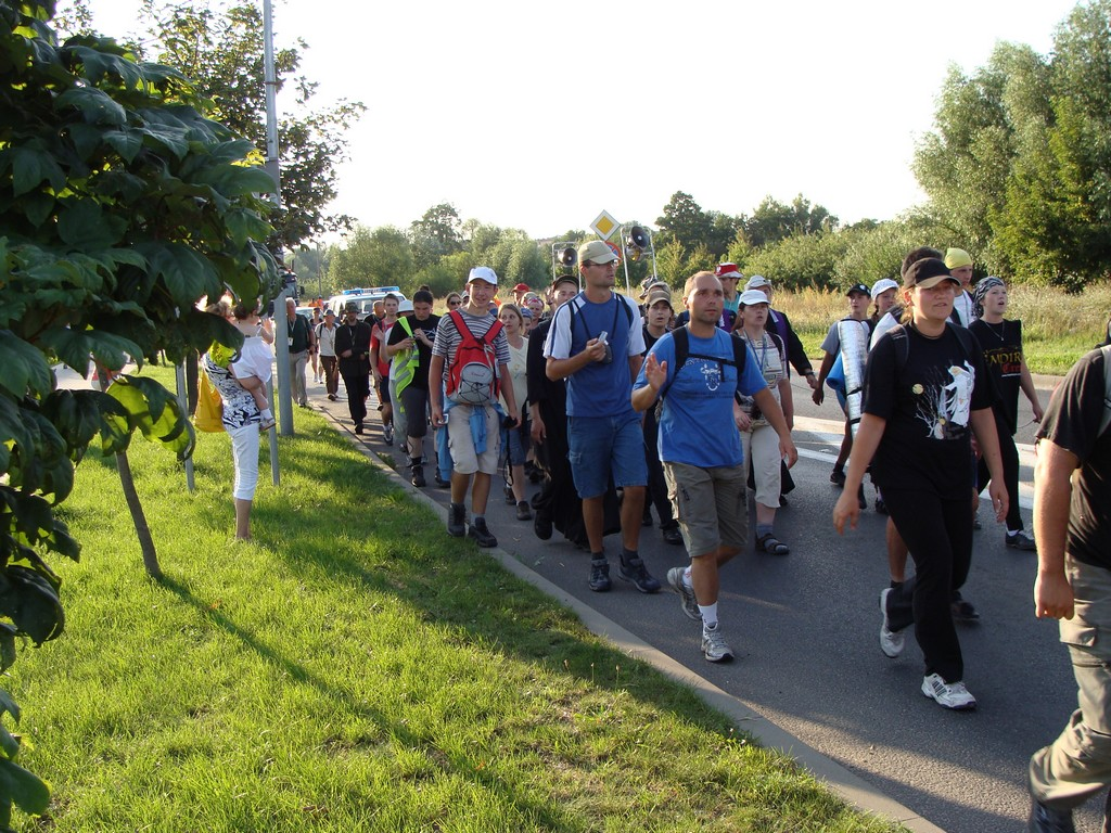 Śrem, Szczecińska Piesza Pielgrzymka na Jasną Górę w 2009 roku.